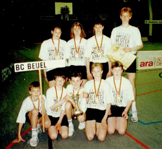 1. BC Beuel, Deutscher Jugend Mannschaftsmeistr 1994